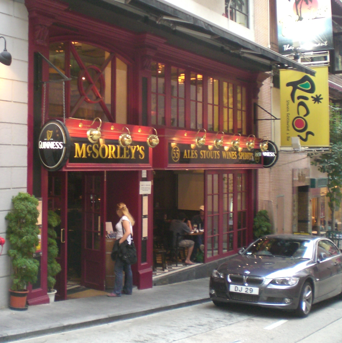 中環蘇豪區伊利近街酒吧及啤酒 Guinness健力士海報